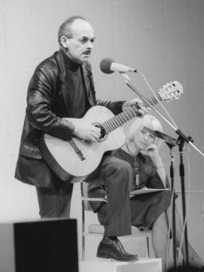 ADN-ZB Reiche 2.12.76 Berlin: Bulat Okudshawa, der in seiner sowjetischen Heimat sehr populäre Dichter, Komponist, Sänger und Gitarrist, gastierte am 2. und 1.12. und am 29.11.76 im Theater im Palast. Die Veranstaltung, von dieser kleinen Bühne und dem Verlag Volk und Welt gemeinsam organisiert, fand großen Anklang beim Publikum. Der Künstler wurde 1924 in Moskau als Sohn einer Armenierin und eines Georgiers geboren. Er veröffentlichte 1956 seine erste Gedichtsammlung, der Werke verschiedener literarischer Genres folgten. Sein historischer Roman "Merci oder die Abenteuer Schipows" soll 1978 im Verlag Volk und Welt erscheinen.